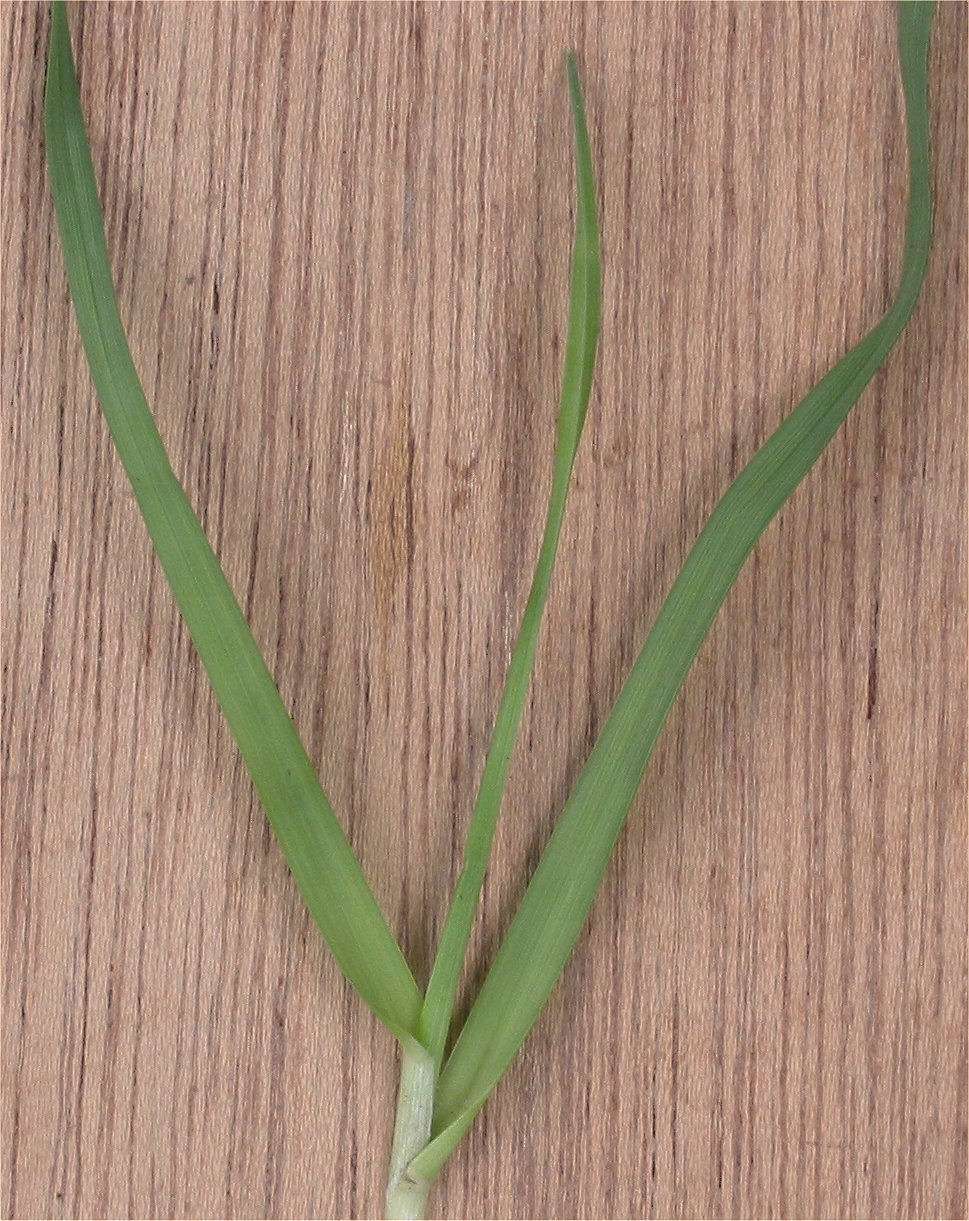 (Kamgras spruit) Cynosurus cristatus